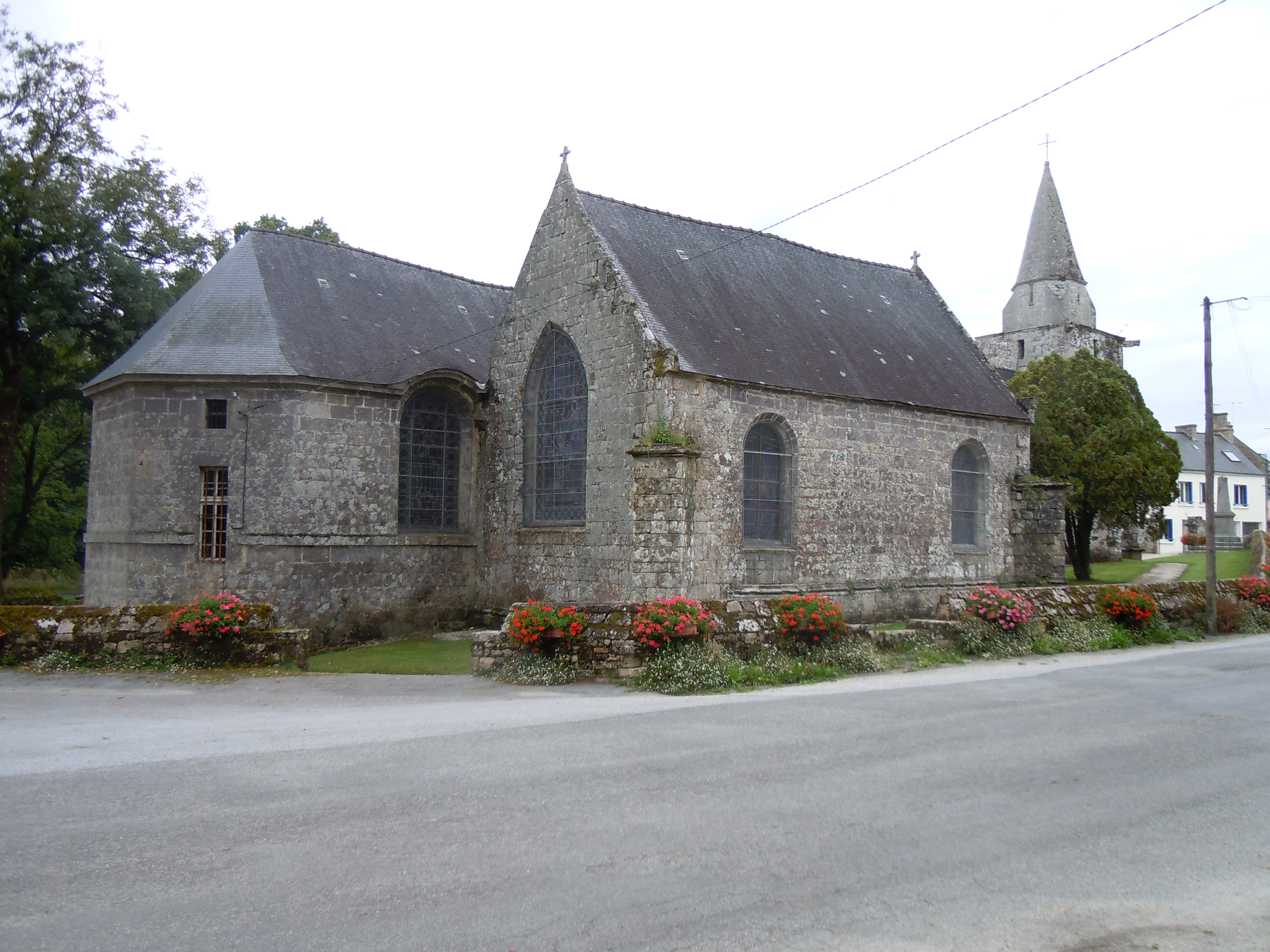 Eglise paroissiale Saint-Malo de Locmalo,département du Morbihan, France .